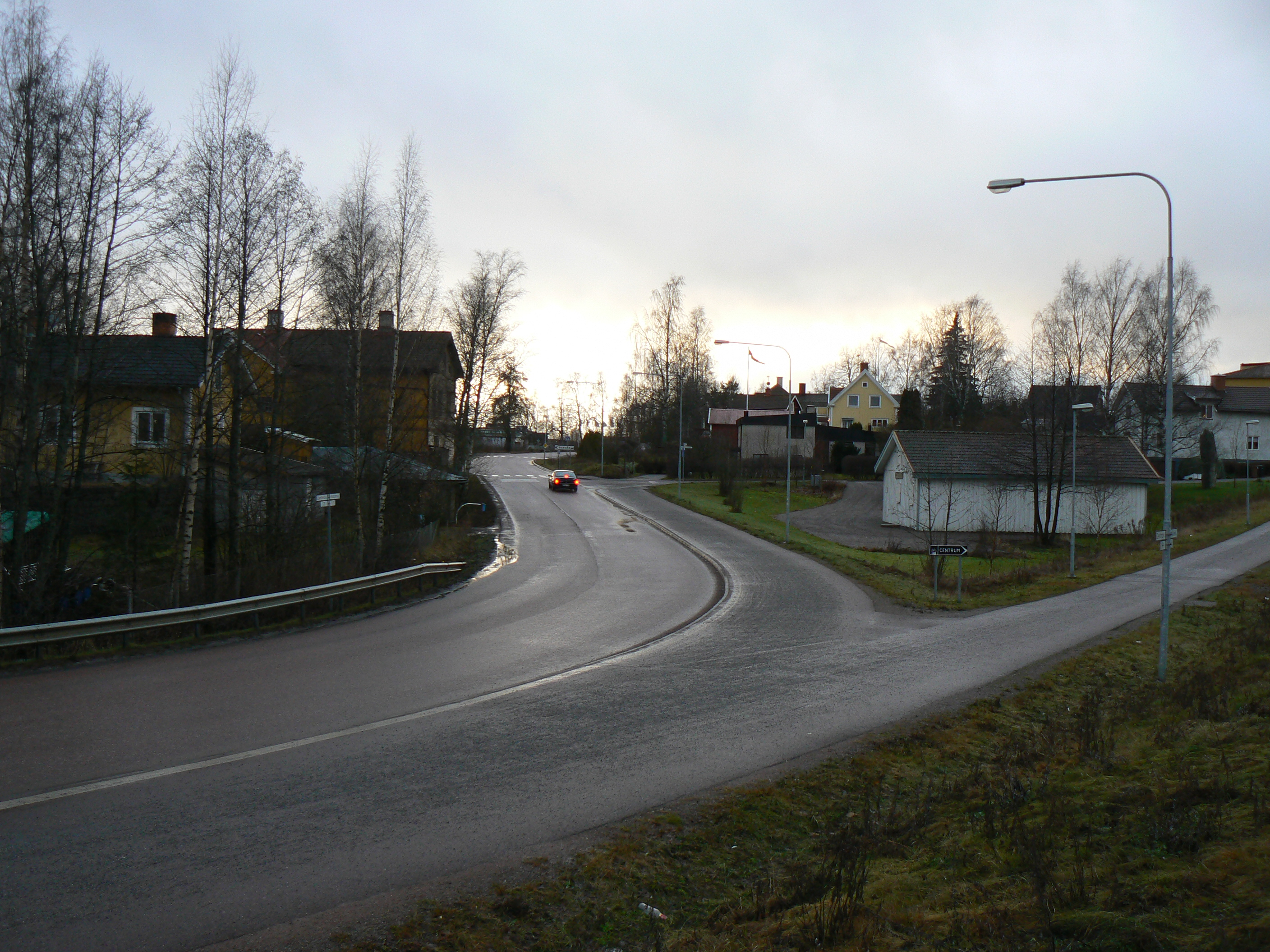 Korsnäs, part of Falun, Sweden. Photo by Skvattram 2007-01-04.